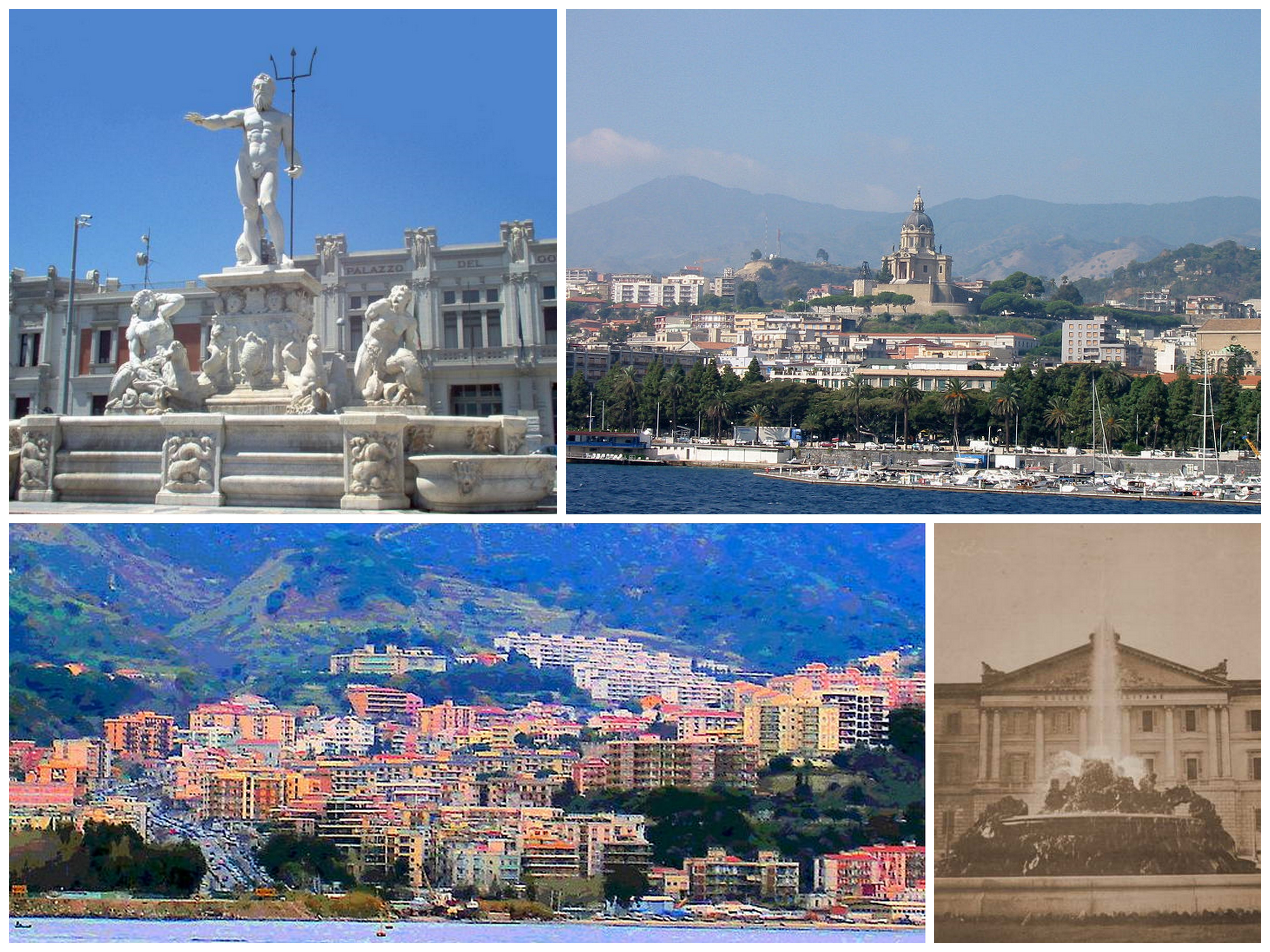 Collage di varie foto di Messina